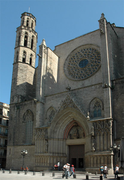 Façana de l'església de Santa Maria del Mar. Barcelona